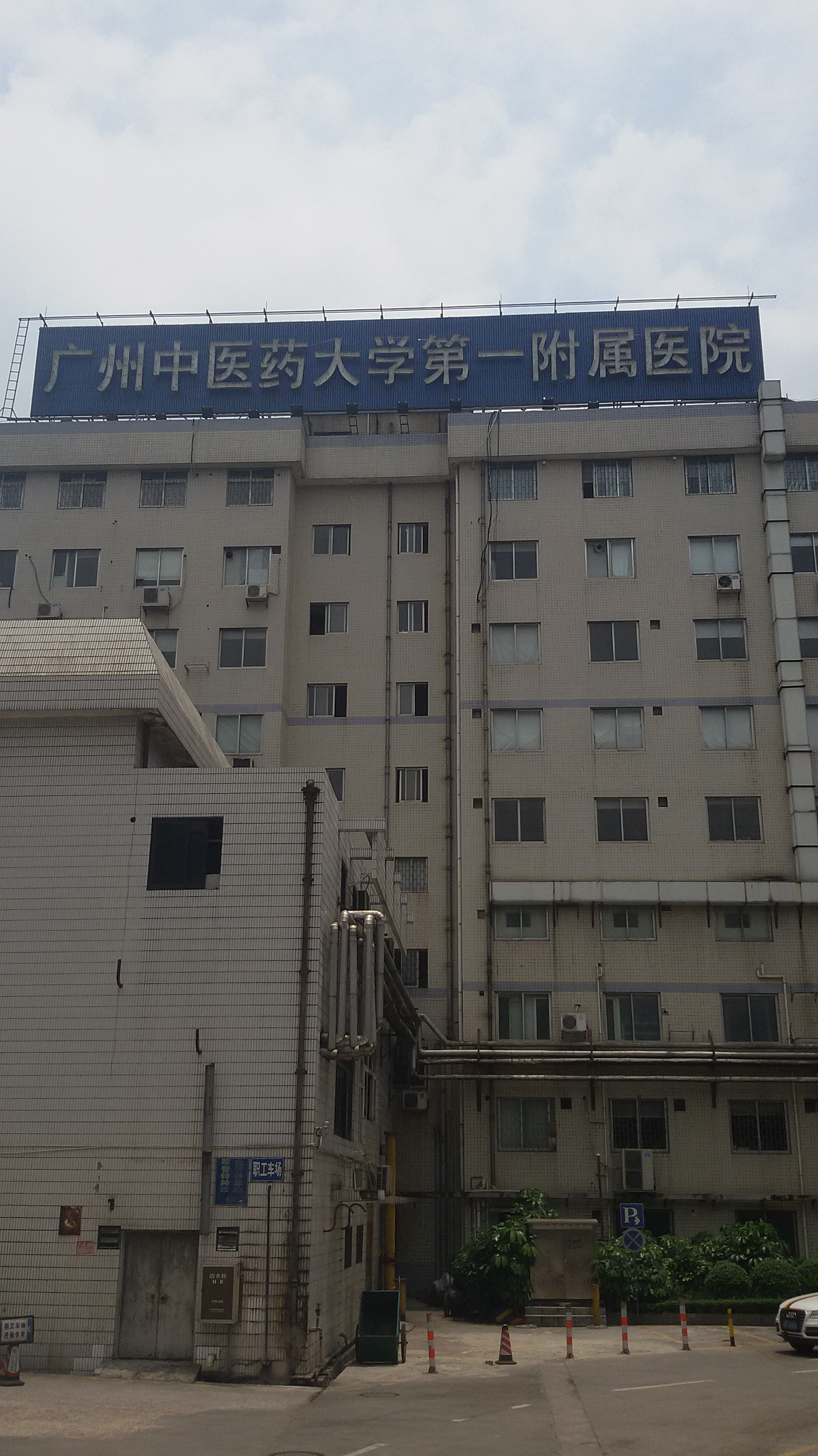 粵語: 广州中医药大学第一附属医院